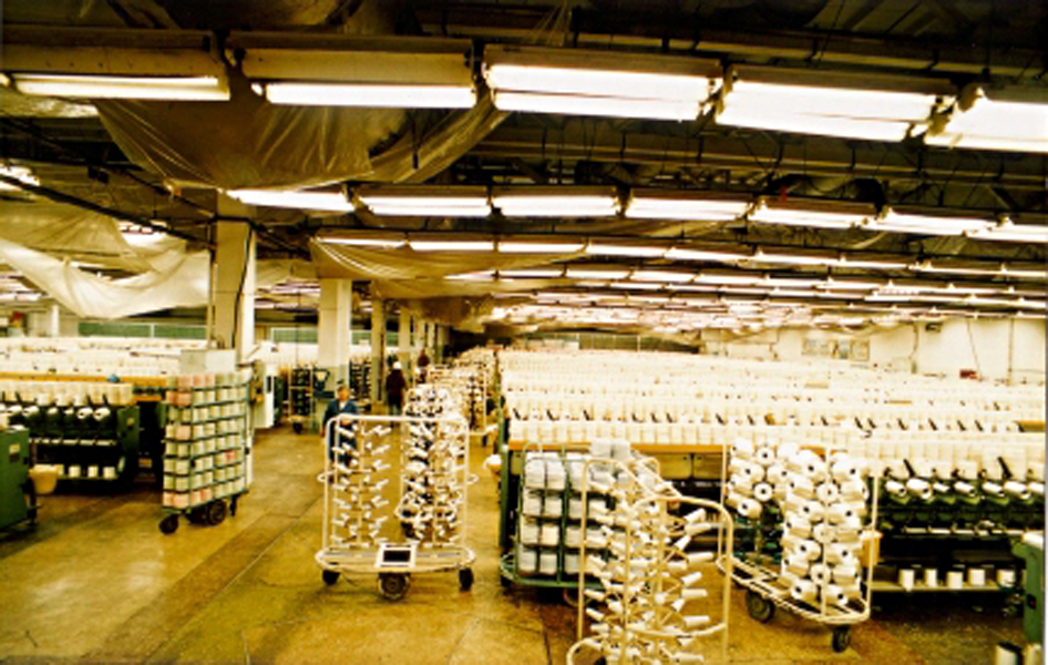 Текстильный цех Балаковского “Химволокно” Автор - Санчес 05 Источник - Собственная работа